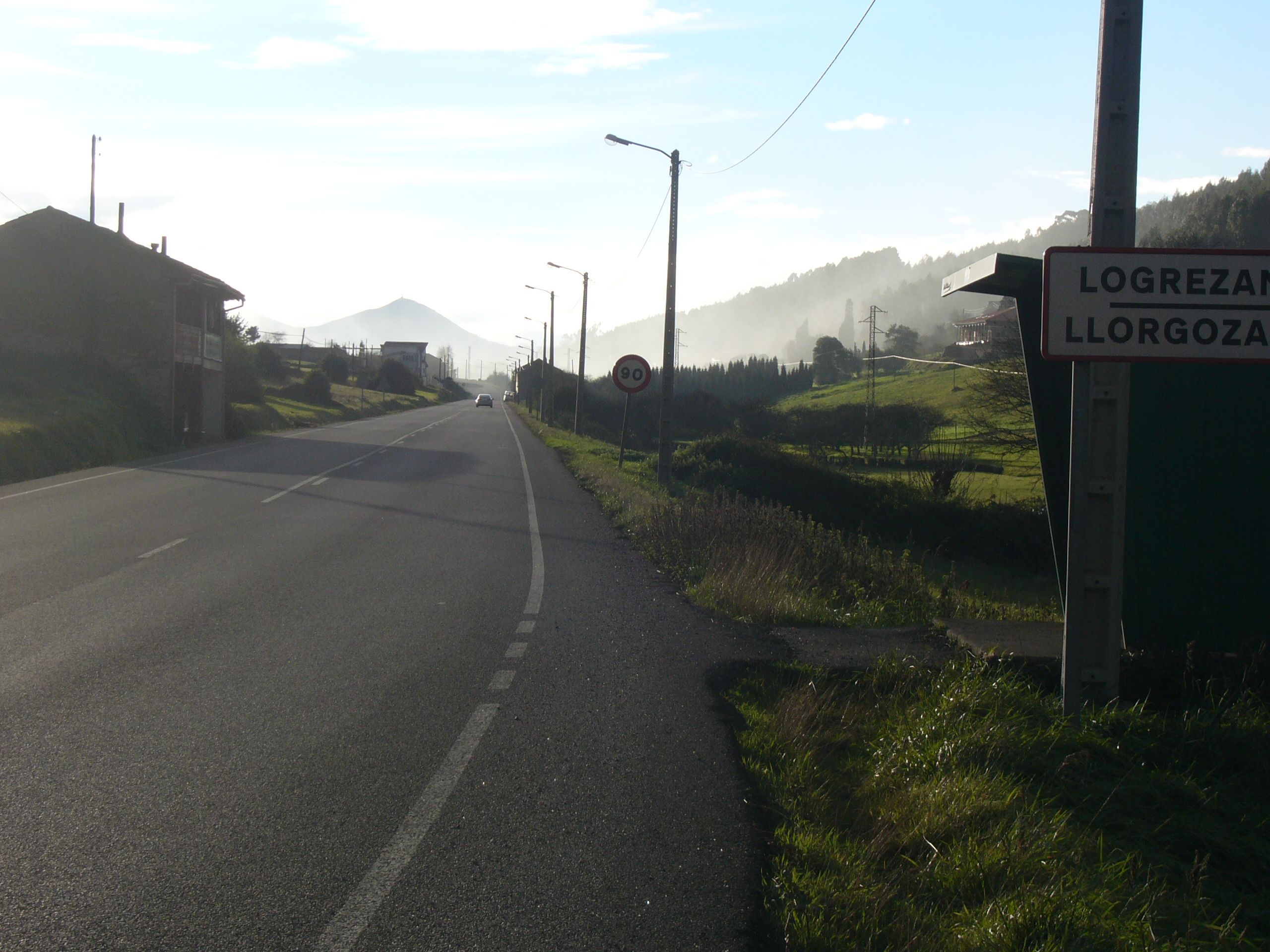 AS-19 road in Llogorzana (Carreño - Asturies - Spain)